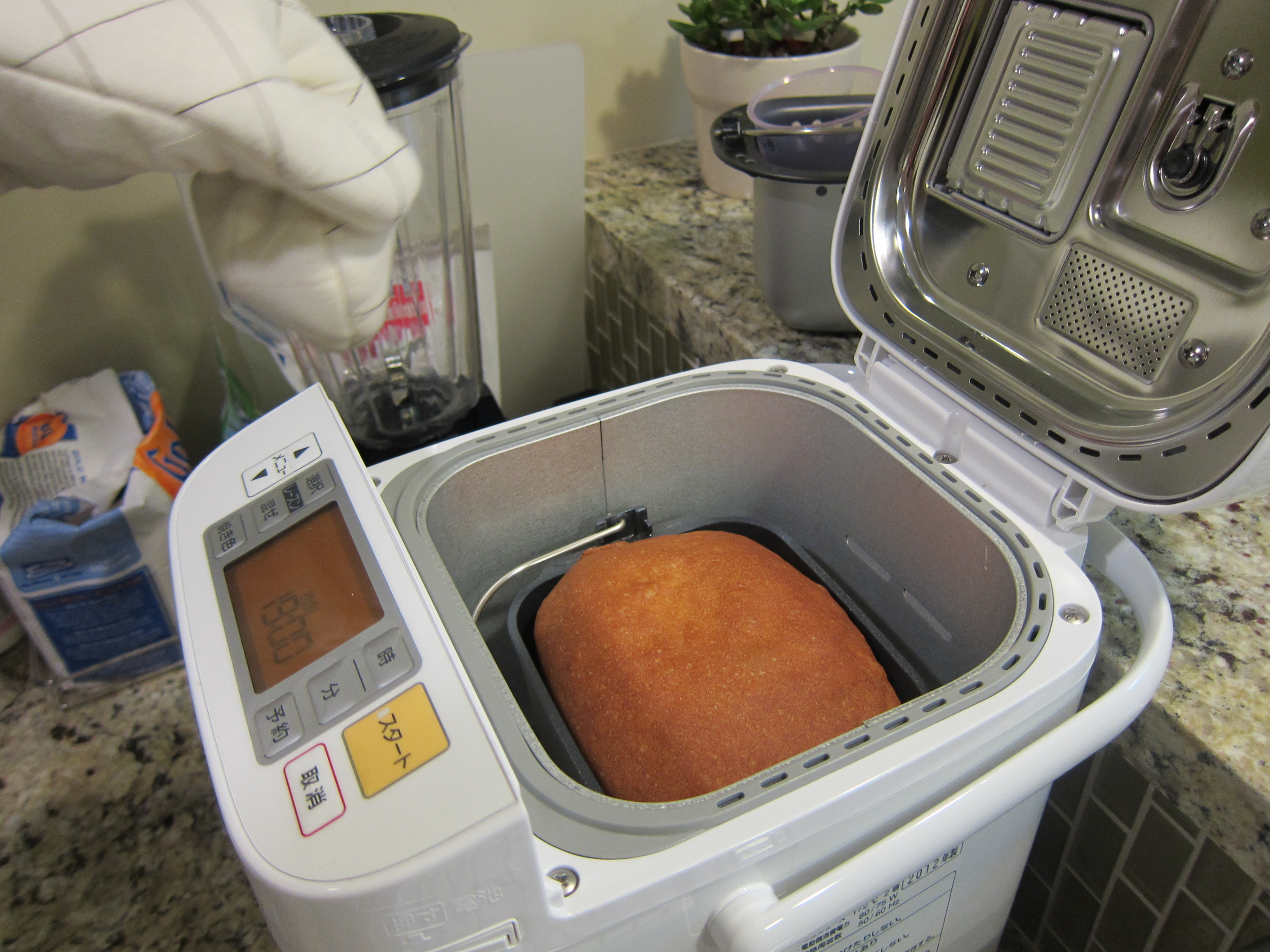 Homemade Bread